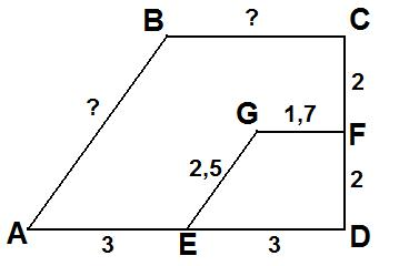 Forholdet mellem DF og DC er 2, da DC er 2 gange længere. Ligeledes er DA 2 gange længere end DE. Multiplikationsfaktoren mellem DEFG og ABCD er altså 2. Så kan man regne ud at BC er 2 gange længere end GF, altså 3,4. På samme måde er AB 5.